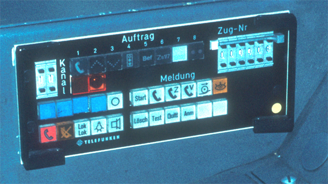 Zugbahnfunk zoals bij DB locomotief 103 174